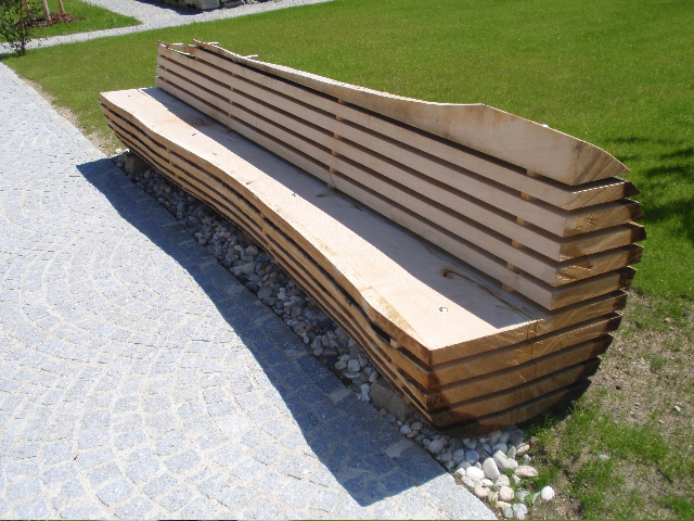 Sitzbank "Hirschbach". Sitzbank, Vorplatzgestaltung Gemeinde Hirschbach im Mühlviertel OÖ., Länge 5m.